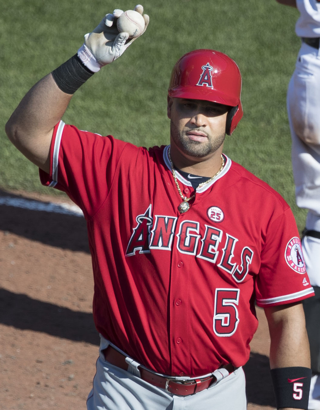 Angels at Orioles 8/20/17